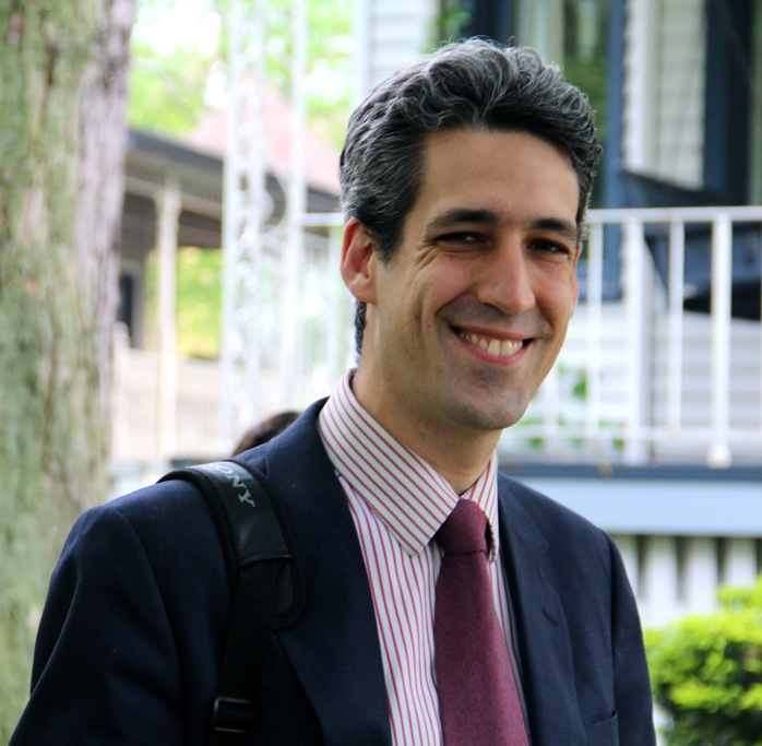 Illinois State Senator Daniel Biss.